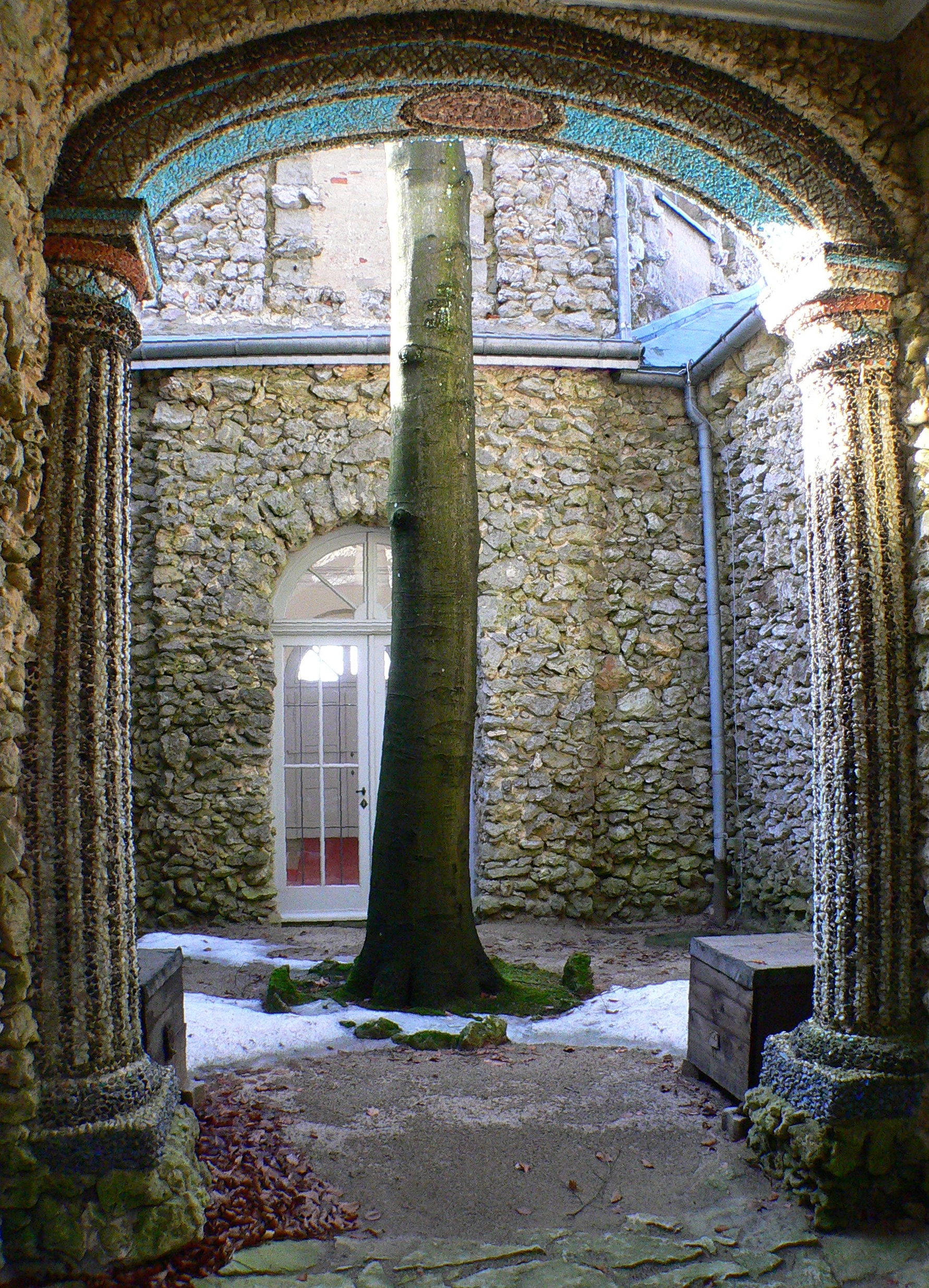 Grotto - Felsengarten Sanspareil, Innenhof Morgenländischer Bau - Fränkische Schweiz, Bayern